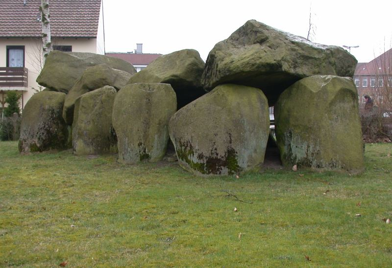 Steingrab in Osterholz-Scharmbeck. Photographiert im März 2005. Photograph: ratopi